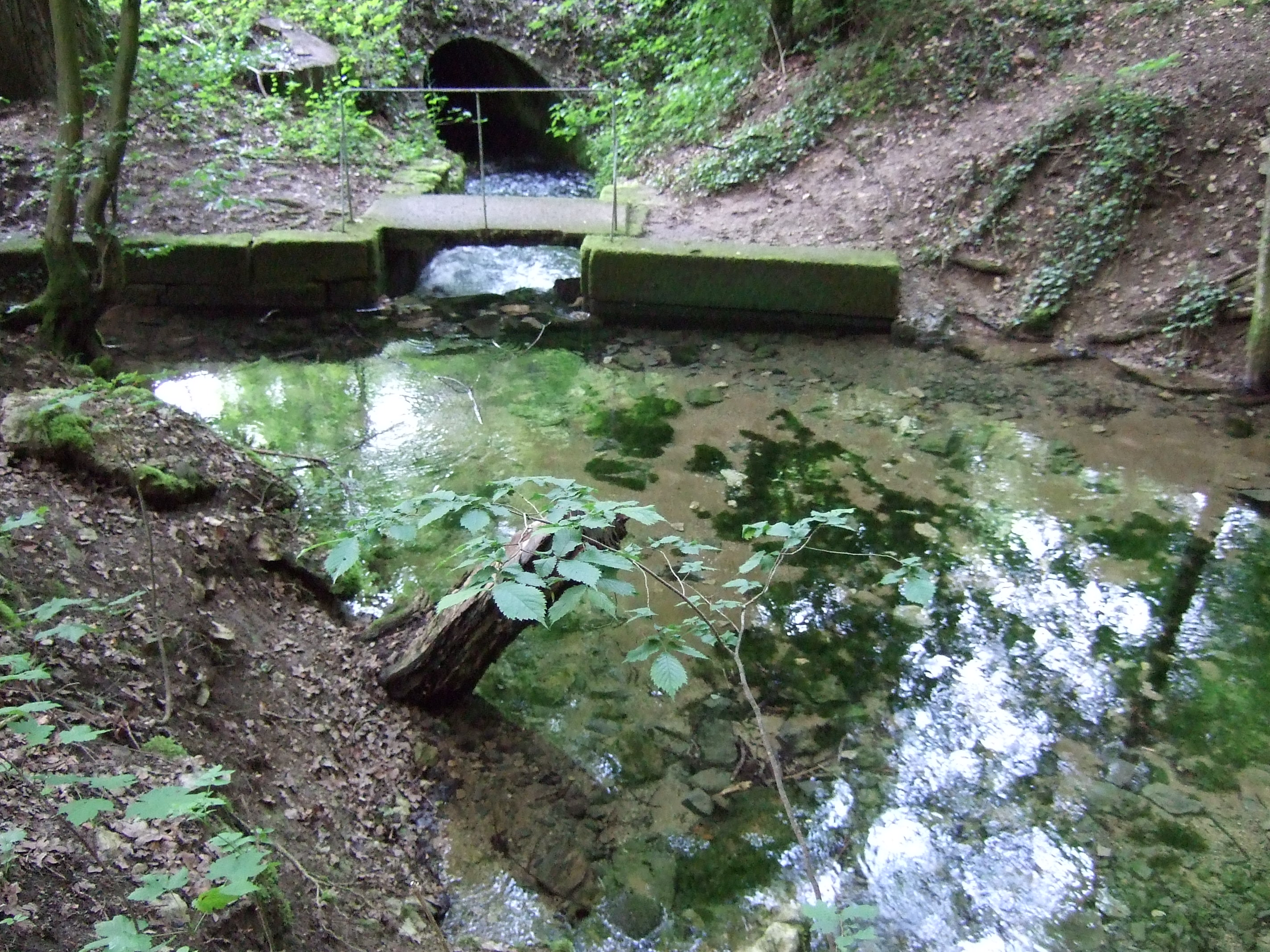 Die Friesenquelle (400l/s) bei Kasendorf